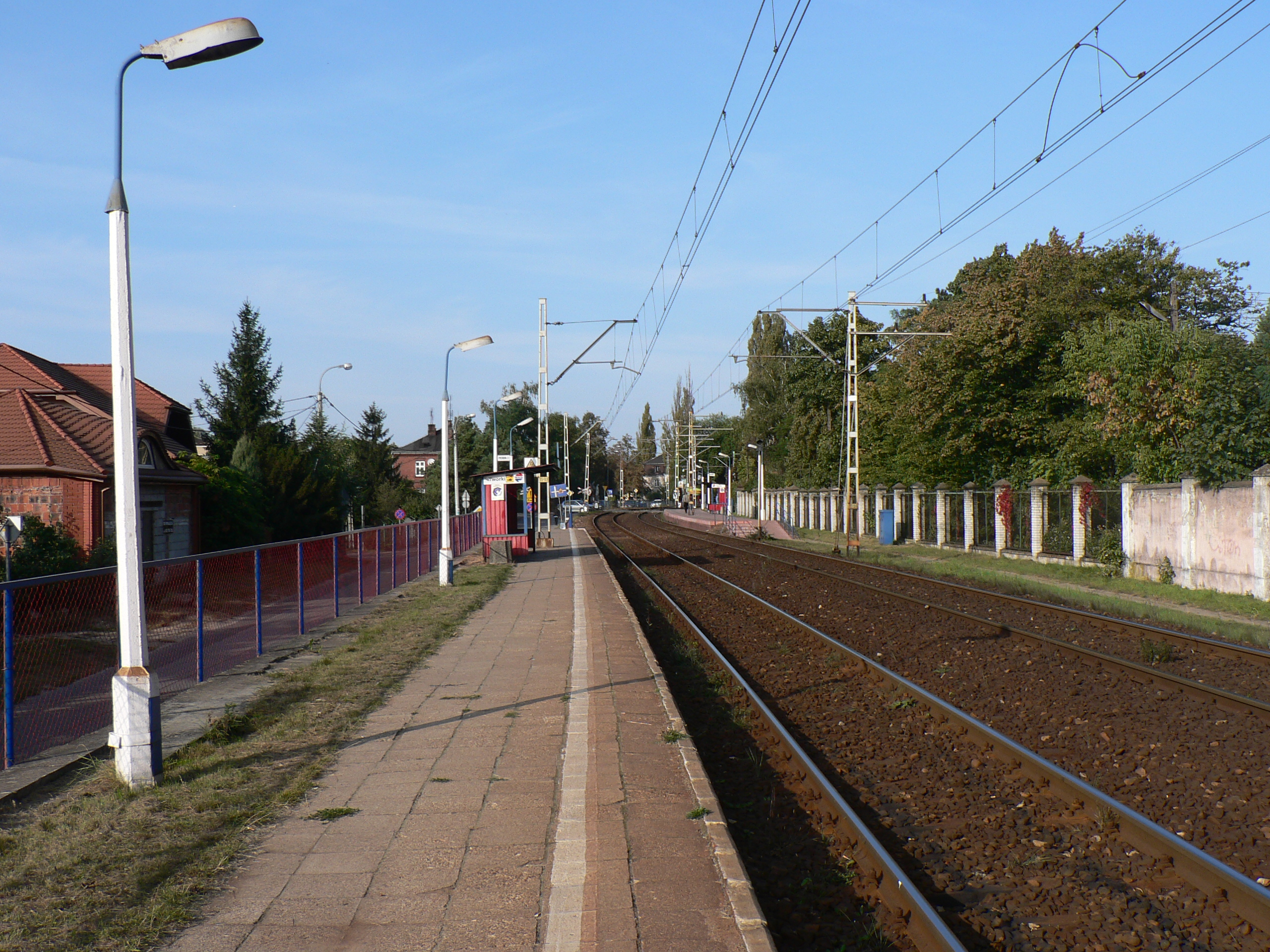 Stacja WKD Tworki w Pruszkowie